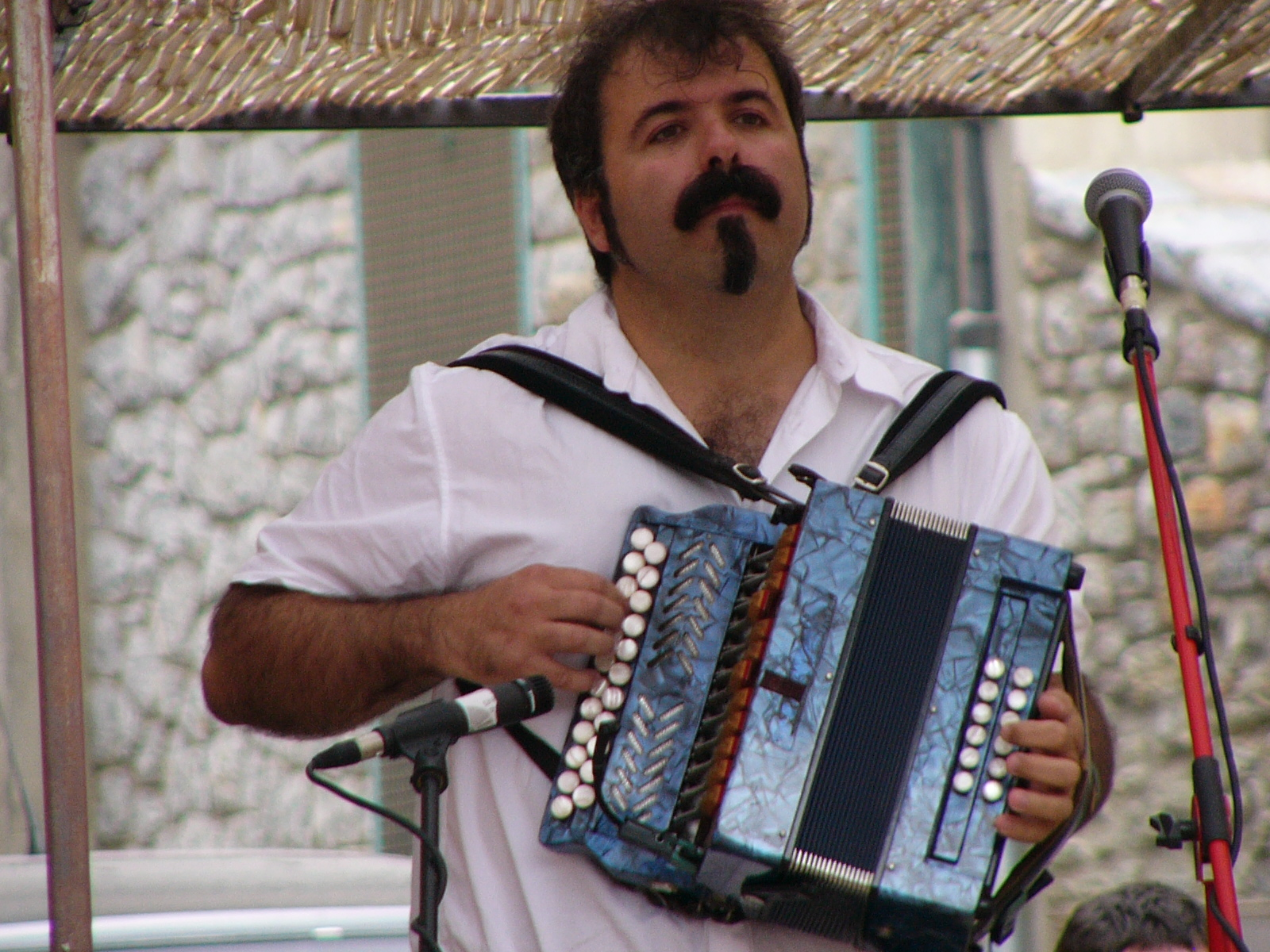 Joseba Tapia tocant la Trikitixa, model basc de l'acordió diatònic